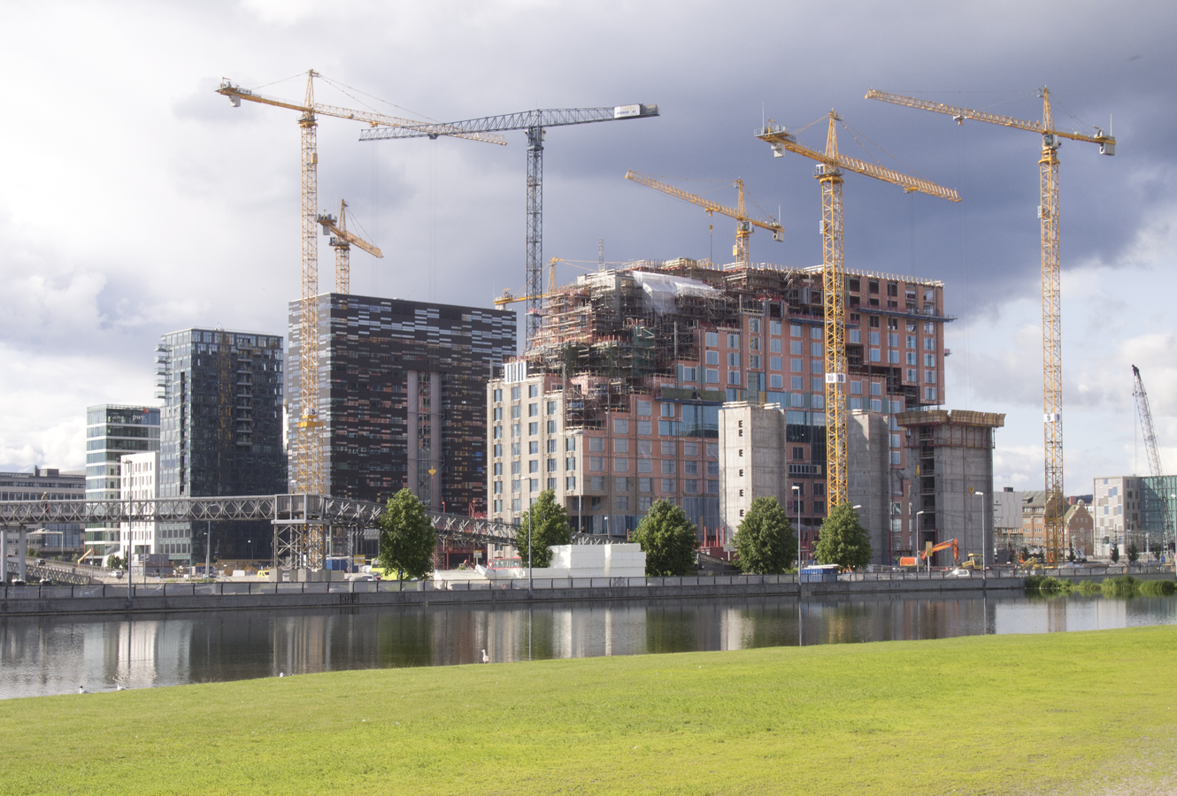 Barcode-prosjektet sett fra Middelalderparken